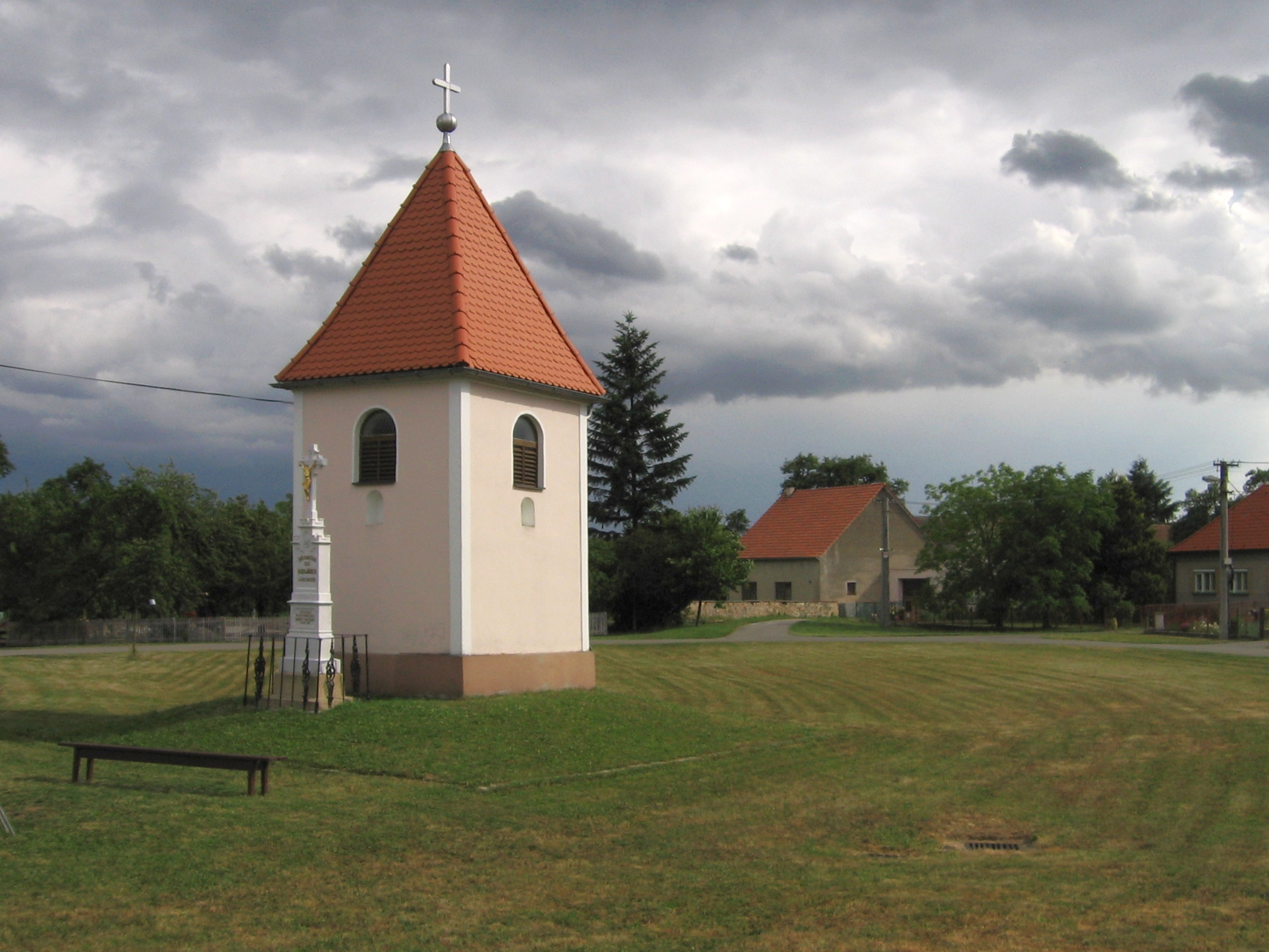 Kramolín (okres Třebíč) - zvonice na návsi.